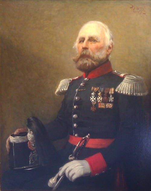 Portret van Kapitein Jhr. Carel Hendrik Meijer door Piet Slager Jr.